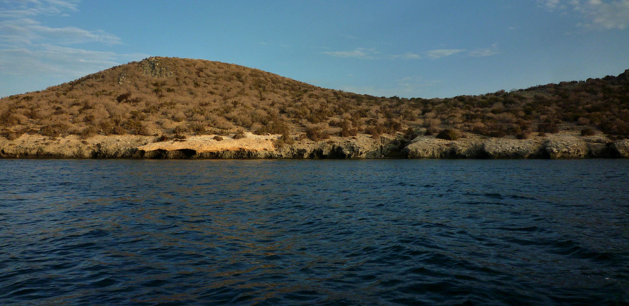 Isla Perdiguera en el Mar Menor, Región de Murcia (España).